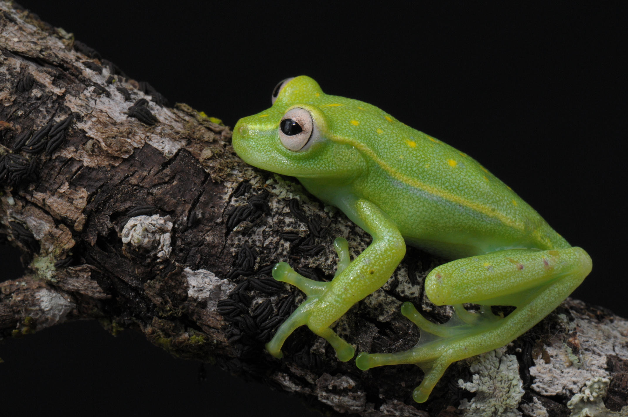 Perereca-verde - Hypsiboas atlanticus - Espécie endêmica da Mata Atlântica e nordeste Brasileiro a imagem foi registrada na Bahia.